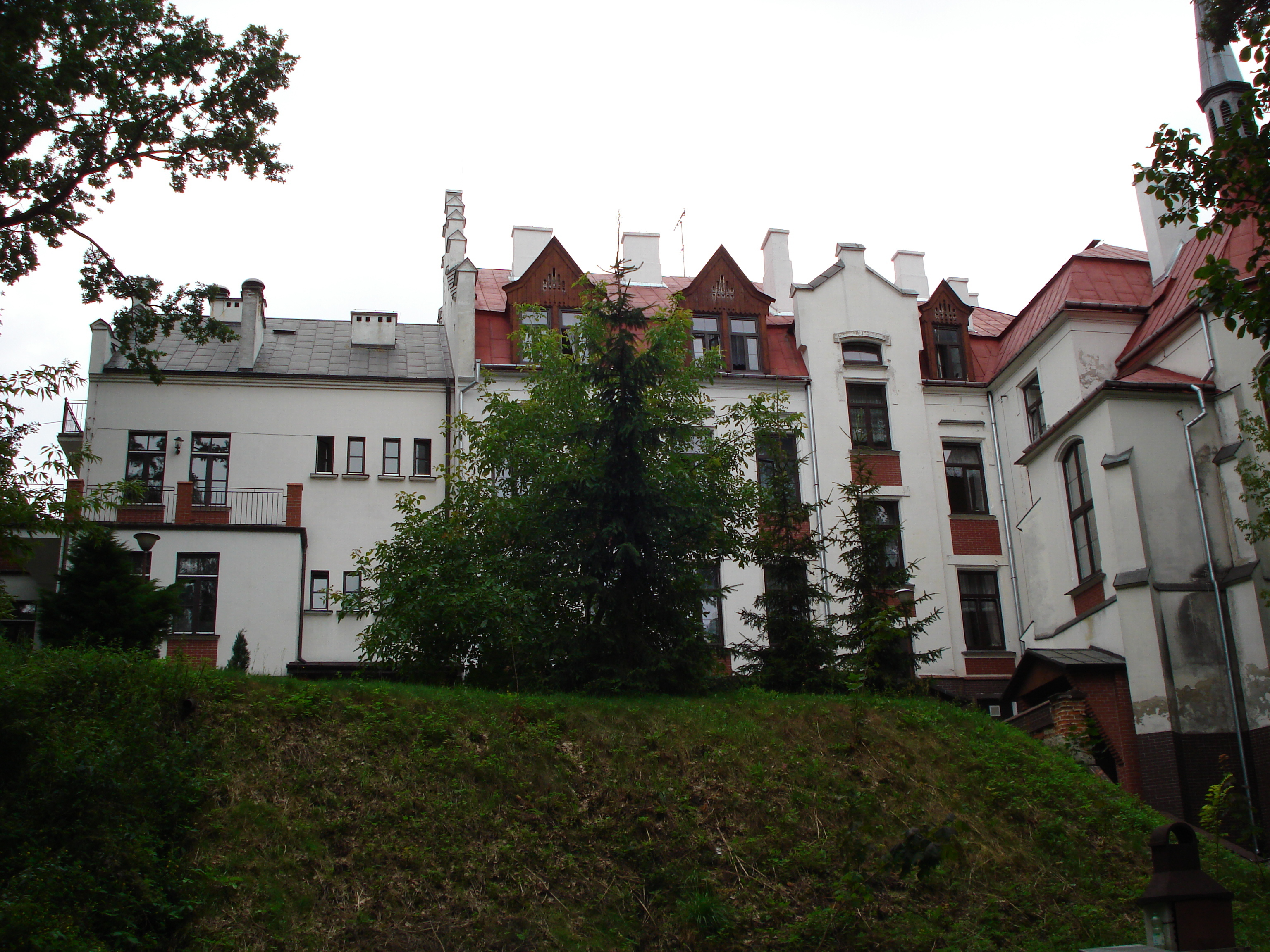 Dom pomocy społecznej w Zielonce